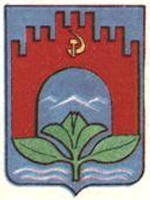 Герб Чернівців радянського періоду